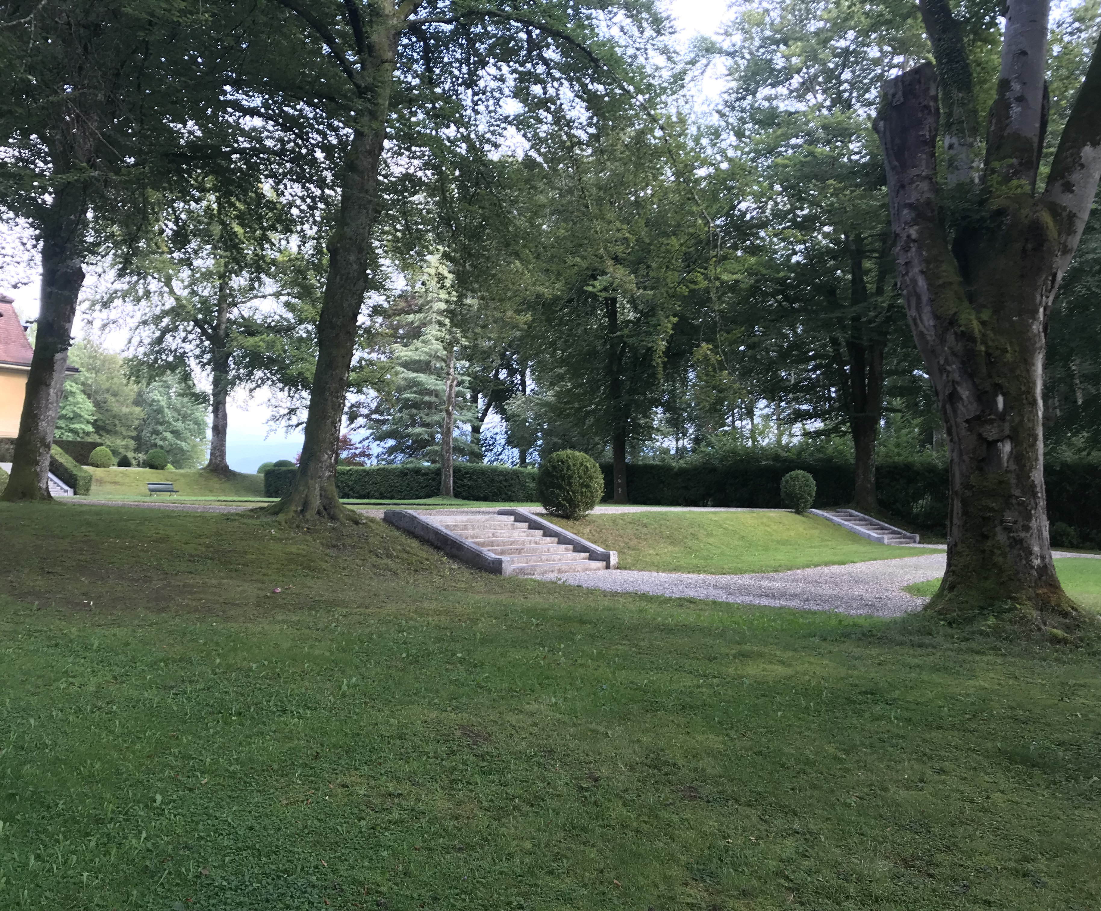 Bois-Murat terrasses